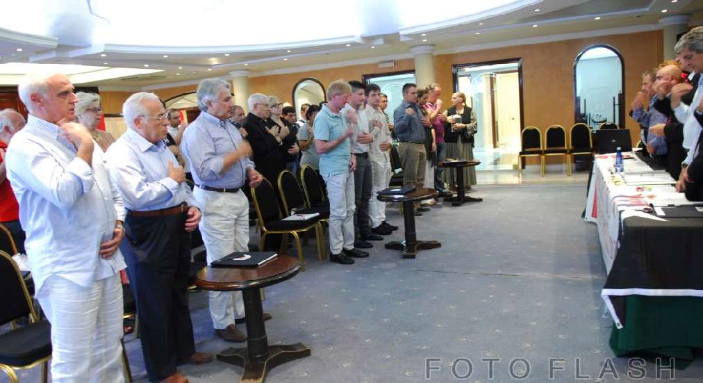 Foto d'archivio dei lavori del Sinodo di Incorporazione del 6-8 ottobre 2012, in Rodi.